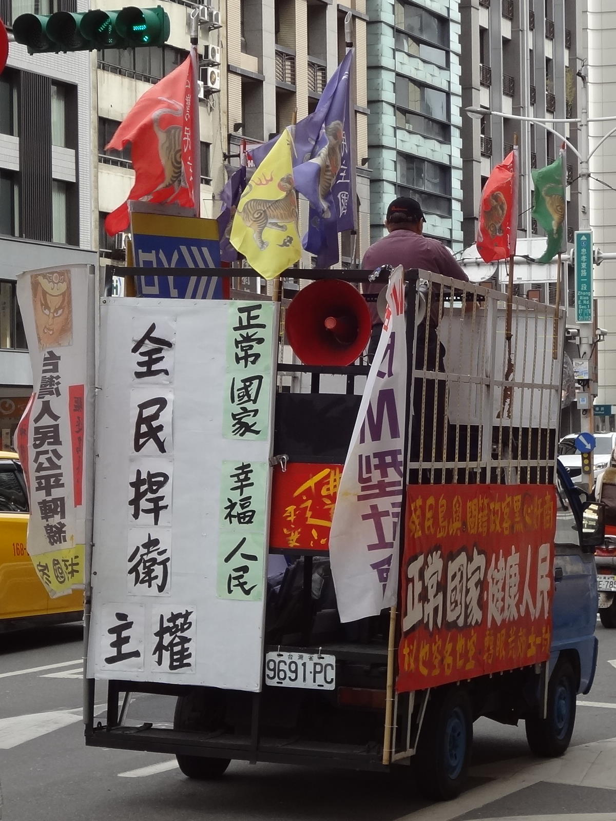 臺北市中正區忠孝東路一段，台灣民主國陣線與台灣人民公平陣線的福特好幫手宣傳車9691-PC。